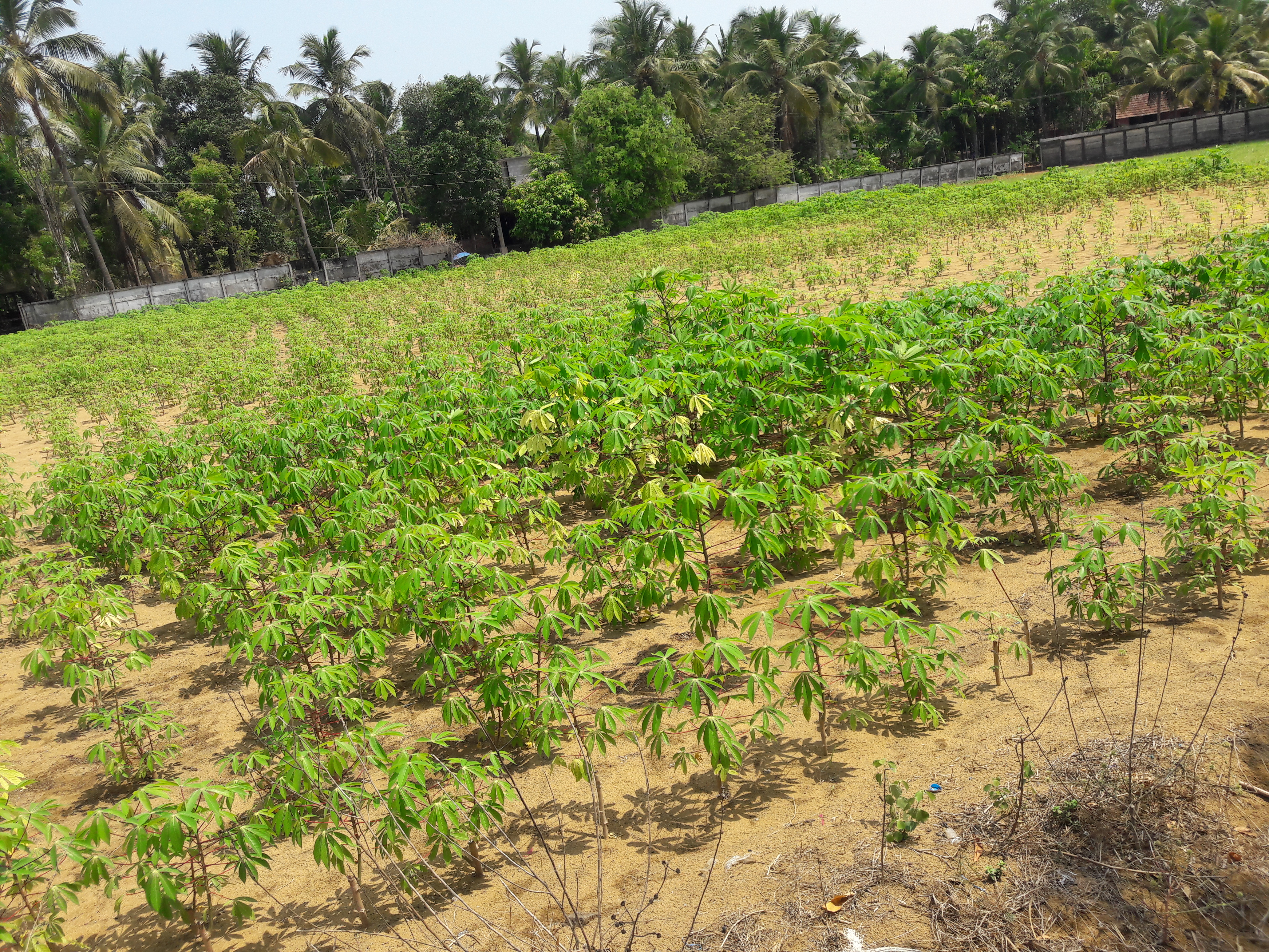 തൃശൂര്‍ ജില്ലയിലെ ചാവക്കാട് താലൂക്കില്‍ പെരിയമ്പലം എന്ന സ്ഥലത്തുള്ള മരച്ചീനി കൃഷി.